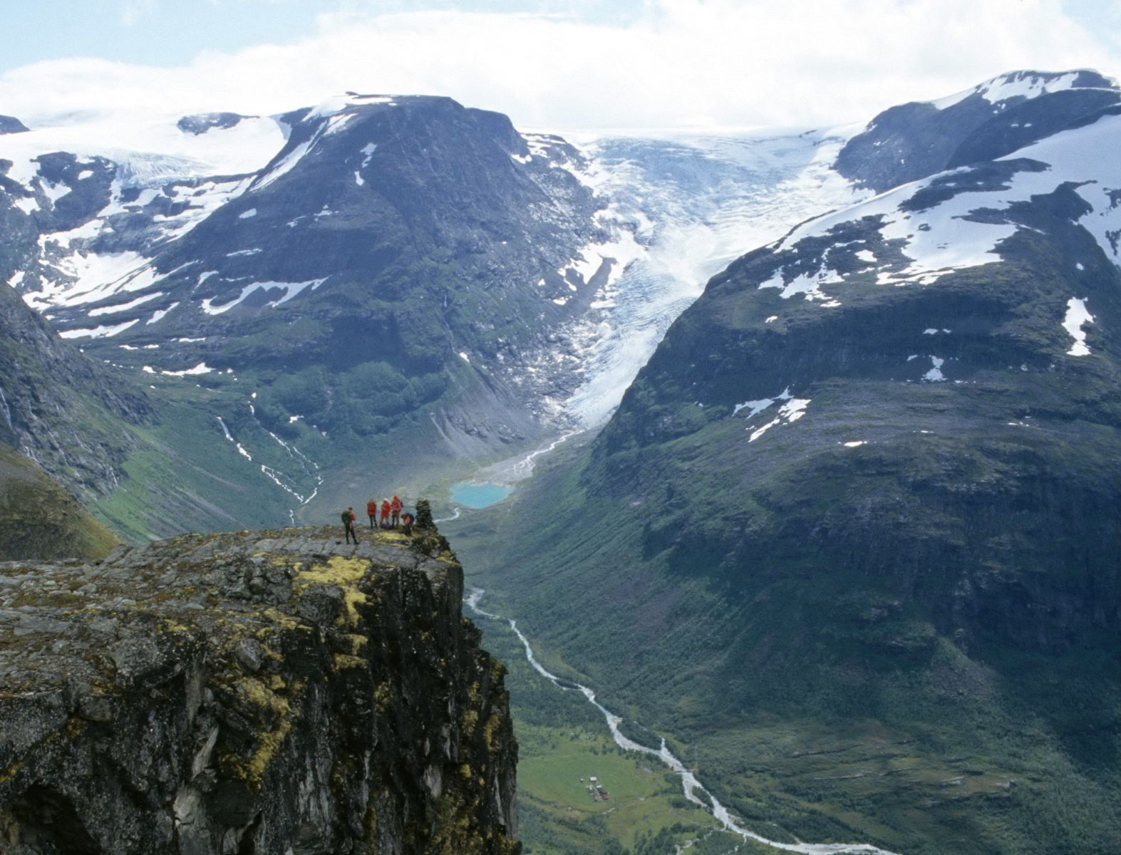 Fjellvandrere ved Bødalen, Stryn.